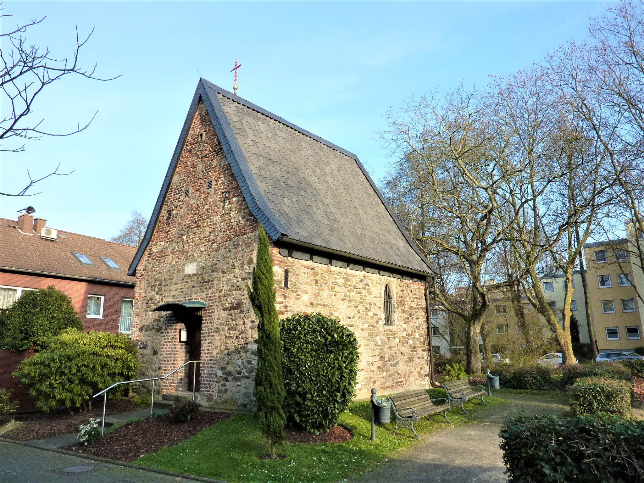 Kapelle St. Stephanus (Köln-Weiden)This is a photograph of an architectural monument.